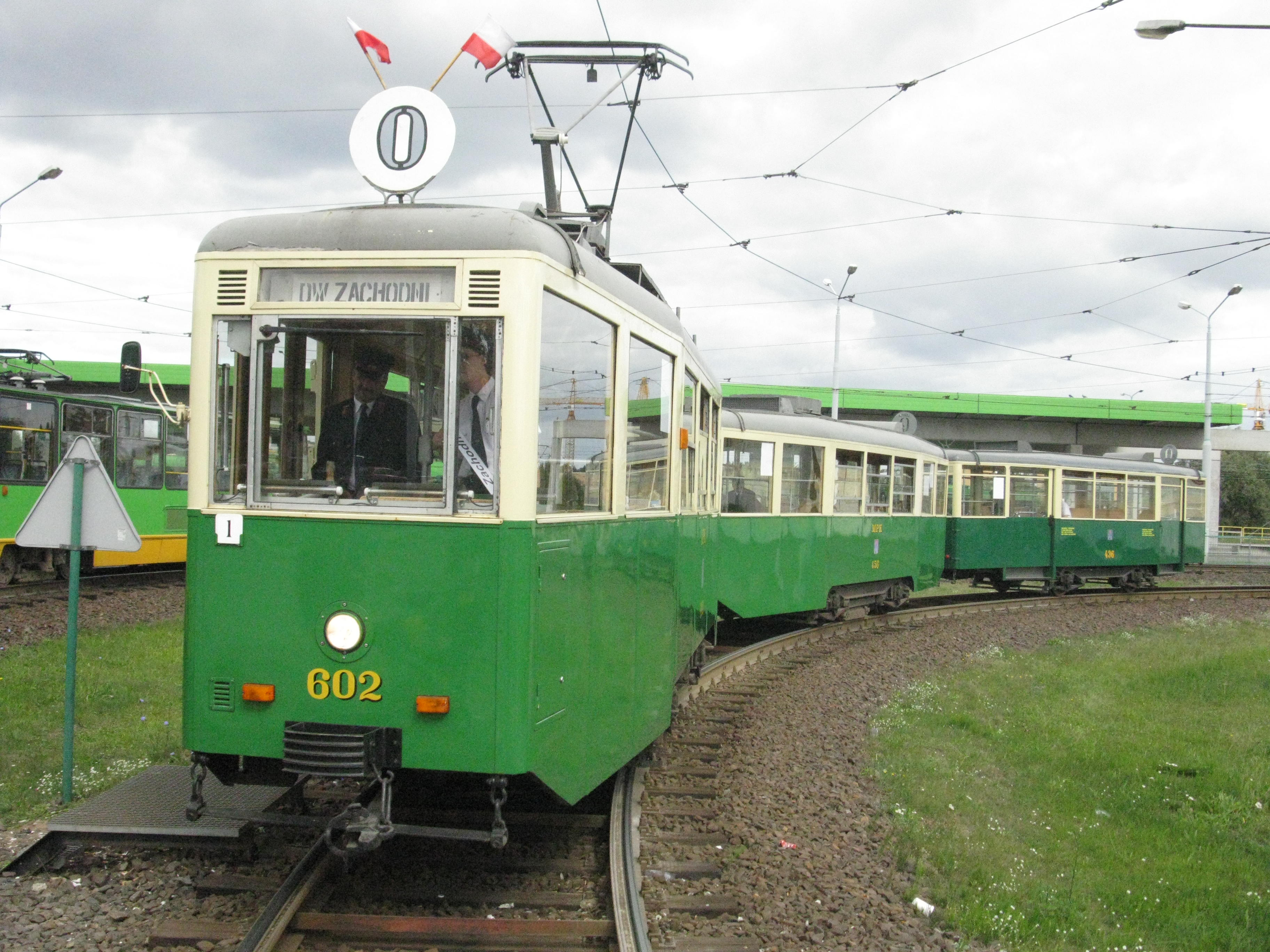 Stacja PST - os. Sobieskiego, Konstal ND